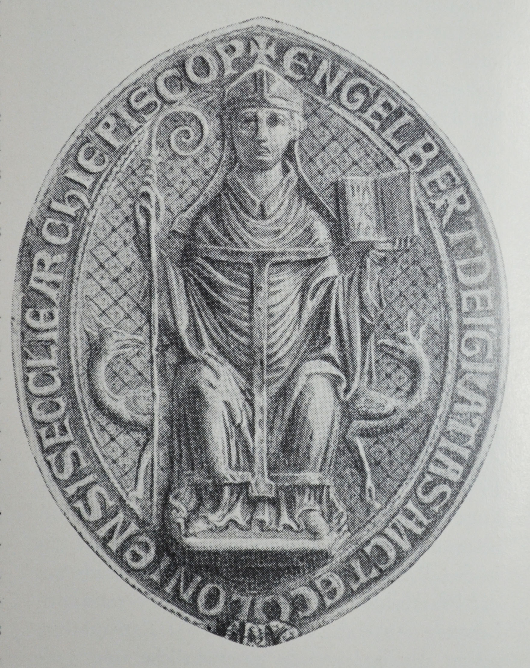 Brilon Stadtsiegel mit dem Bild St. Engelberts